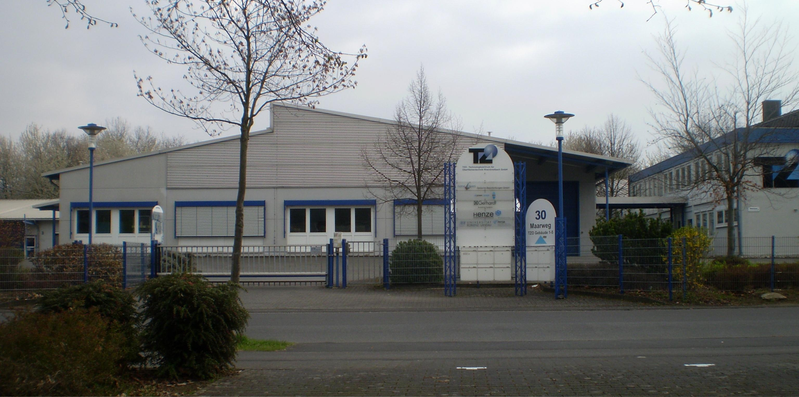 Technologiezentrum für Oberflächentechnik Rheinbreitbach, Maarweg 30